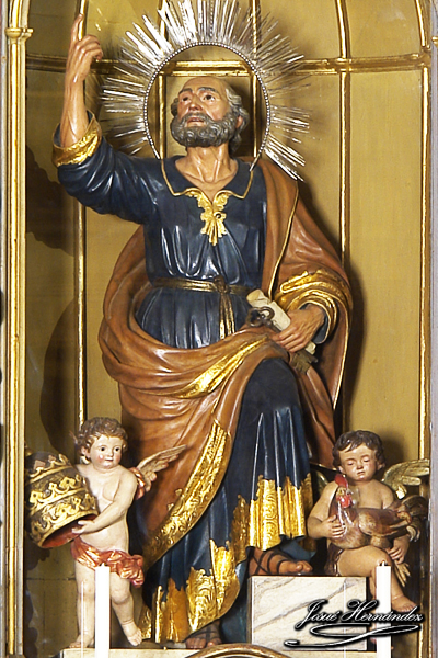 San Pedro Apóstol, anterior a 1820 Fernando Estévez de Salas Parroquia de Nuestra Señora de la Concepción, Villa de La Orotava